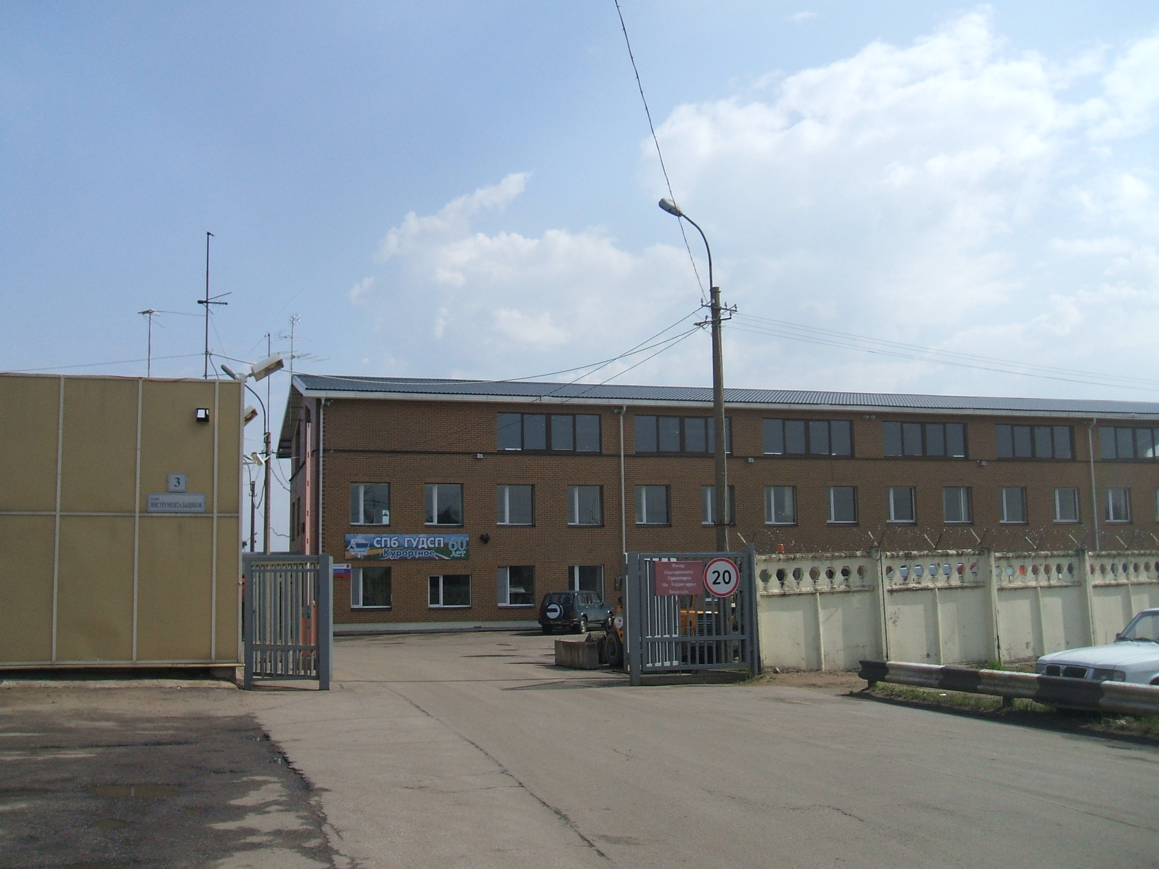 Сестрорецк СПб Спецтранс на ул.Инструментальщиков